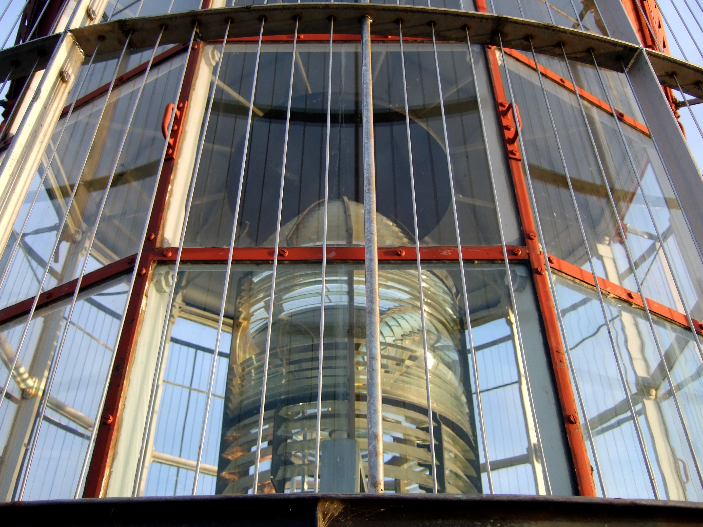 Lens in Sälskär lighthouse in Hammarland, Åland